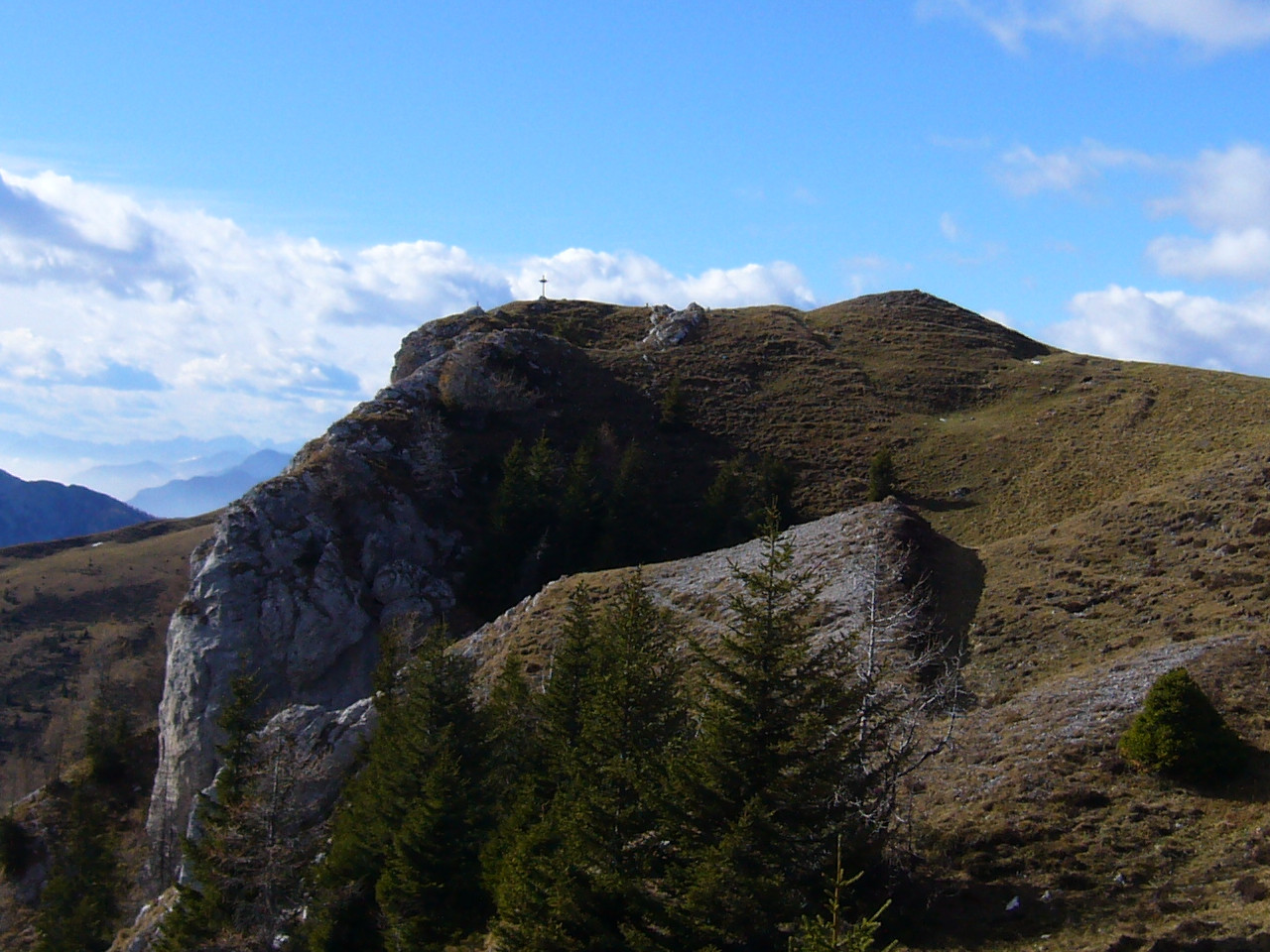 Monte Sagran (1931 m), Alpi Carniche